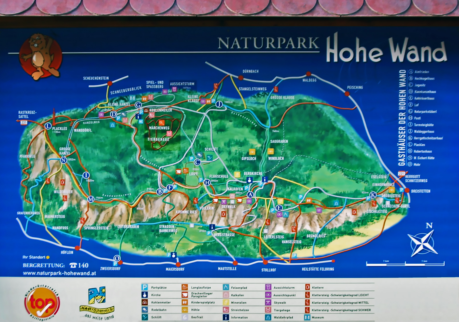 Übersichtskarte des Naturparks Hohe Wand